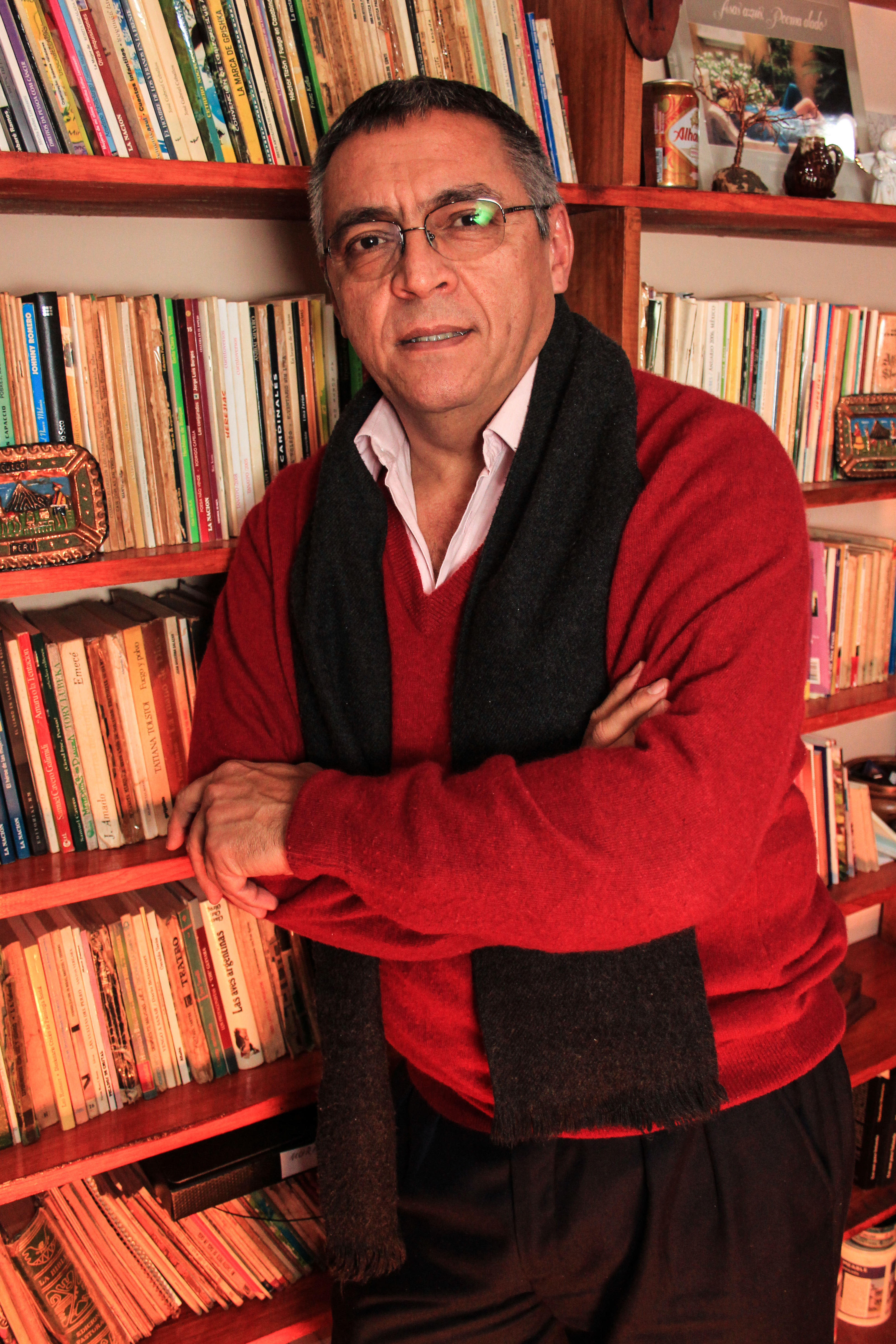 Marcelo Moreyra (n. el 1 de noviembre de 1958 en Tobuna, una localidad argentina ubicada en el departamento San Pedro de la Provincia de Misiones) es un escritor argentino y uno de los referentes más conocidos de la literatura misionera. Moreyra es poeta, pintor, muralista, locutor, docente y fotógrafo. Estudió dibujo, pintura, cerámica, escultura y grabado en la Escuela Municipal de Artes de Iguazú con el artista Floriano “Mandové” Pedrozo. Desde 1969 vive en Puerto Iguazú.